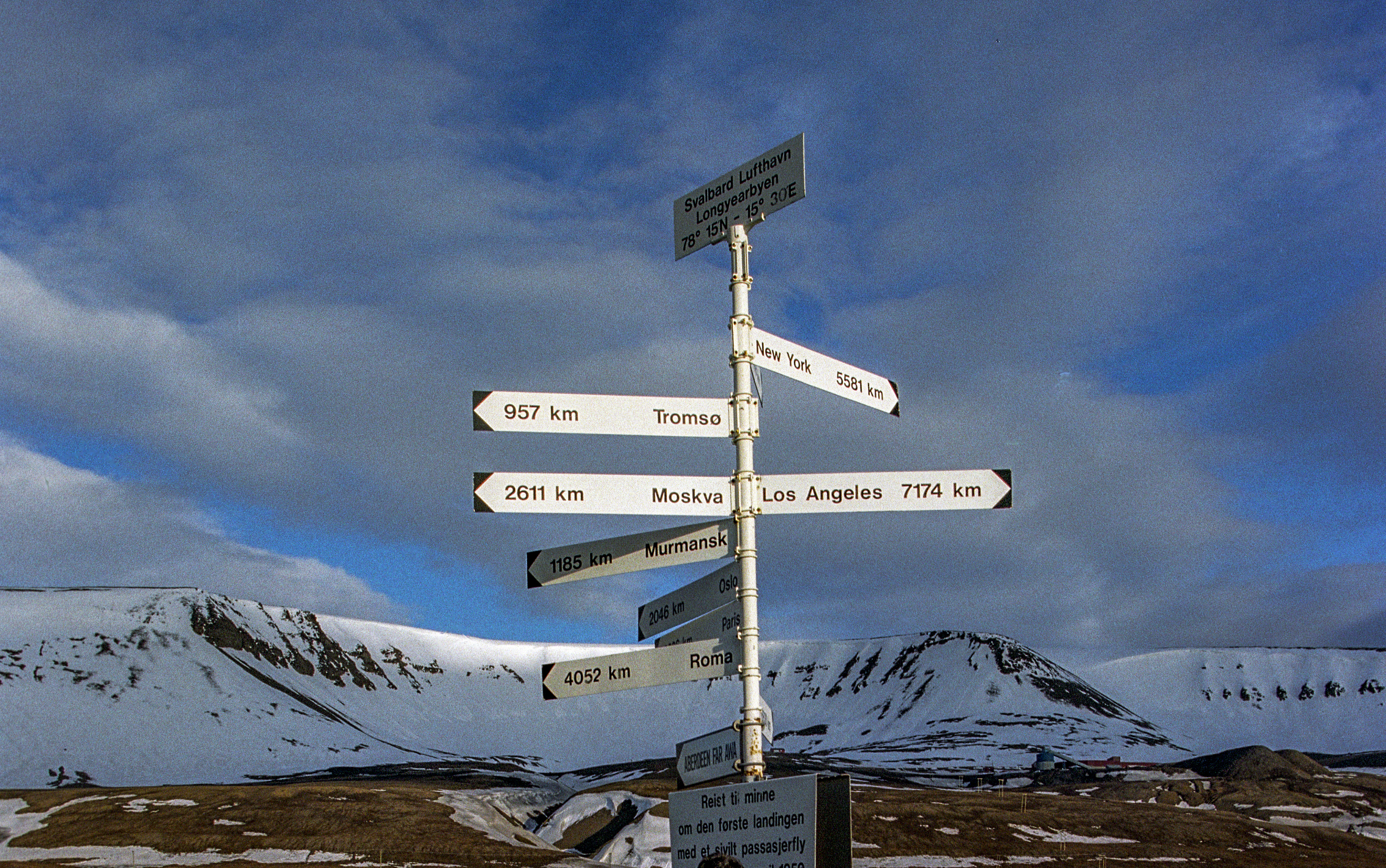 spitsbergen, airport